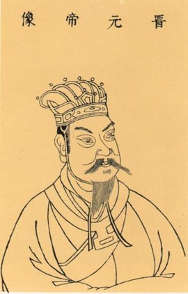 晉元帝像